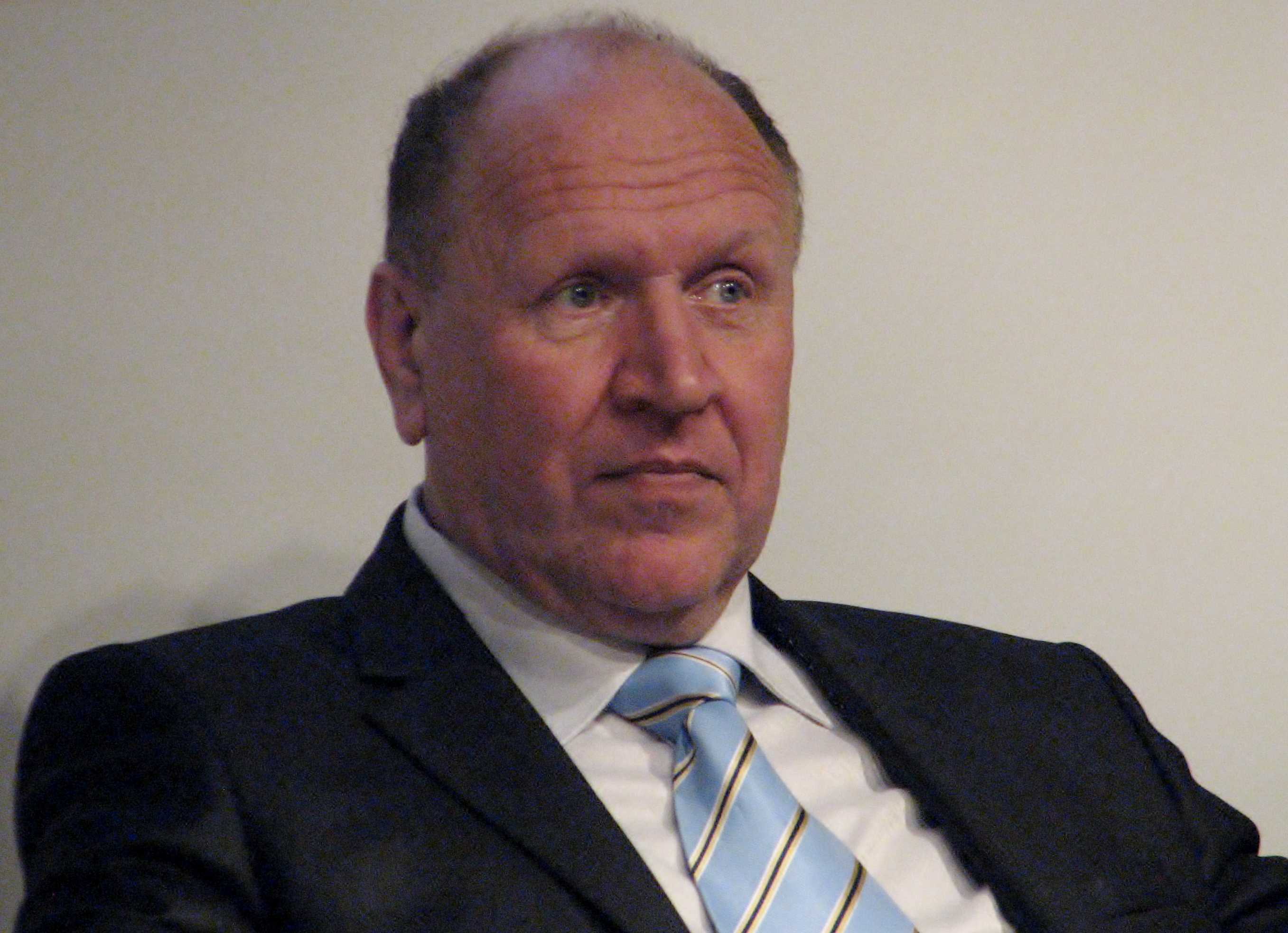 Mart Helme oma raamatu "Poliitikast ja sõjast" esitlusel Solarise keskuse Apollos